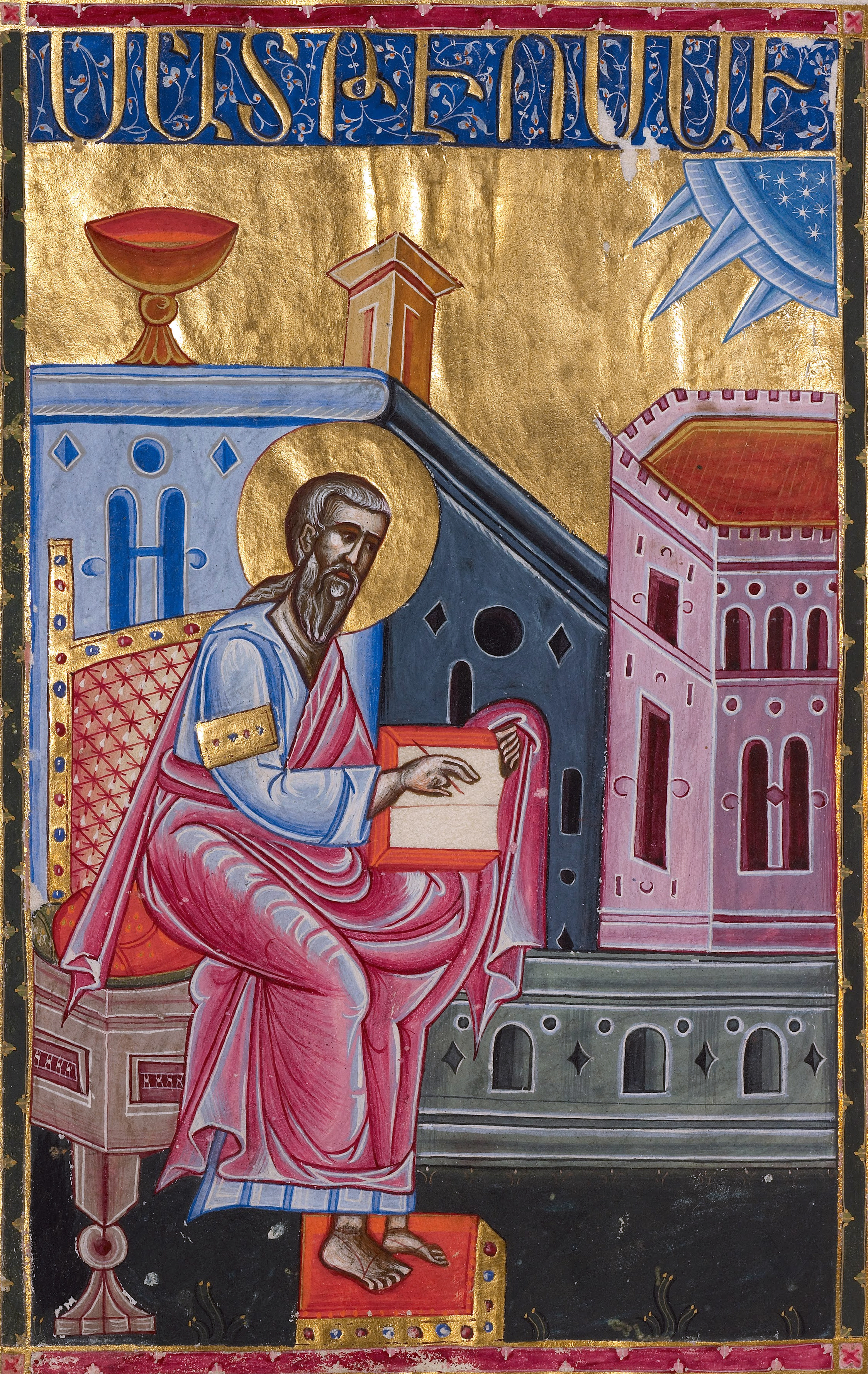 Սուրբ Մատթեոս Ավետարանիչ